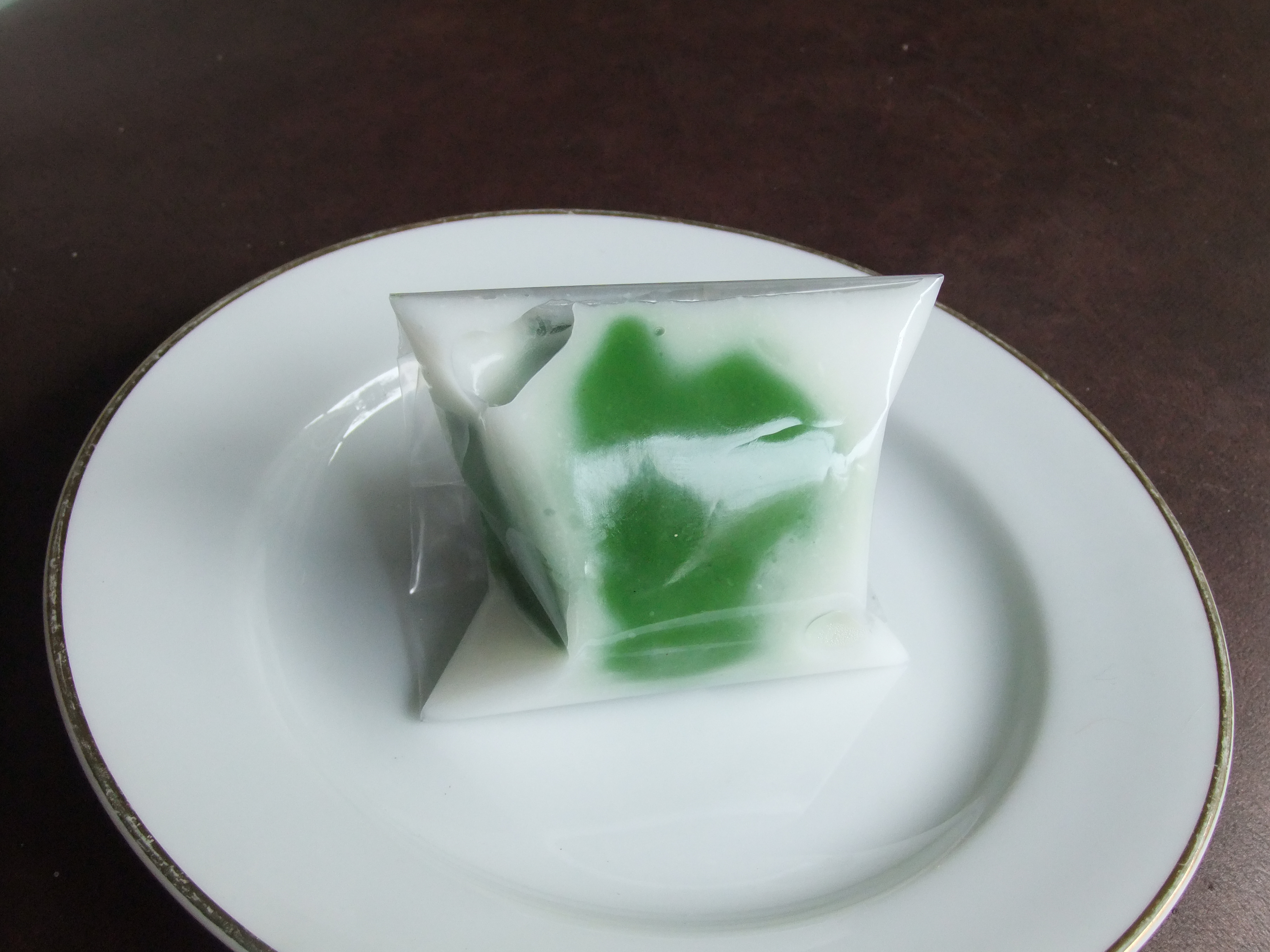 Kue Bugis Mandi